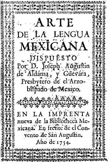 The title page of Arte de la lengua mexicana (1754) by Joseph Augustin de Aldama y Guevara.